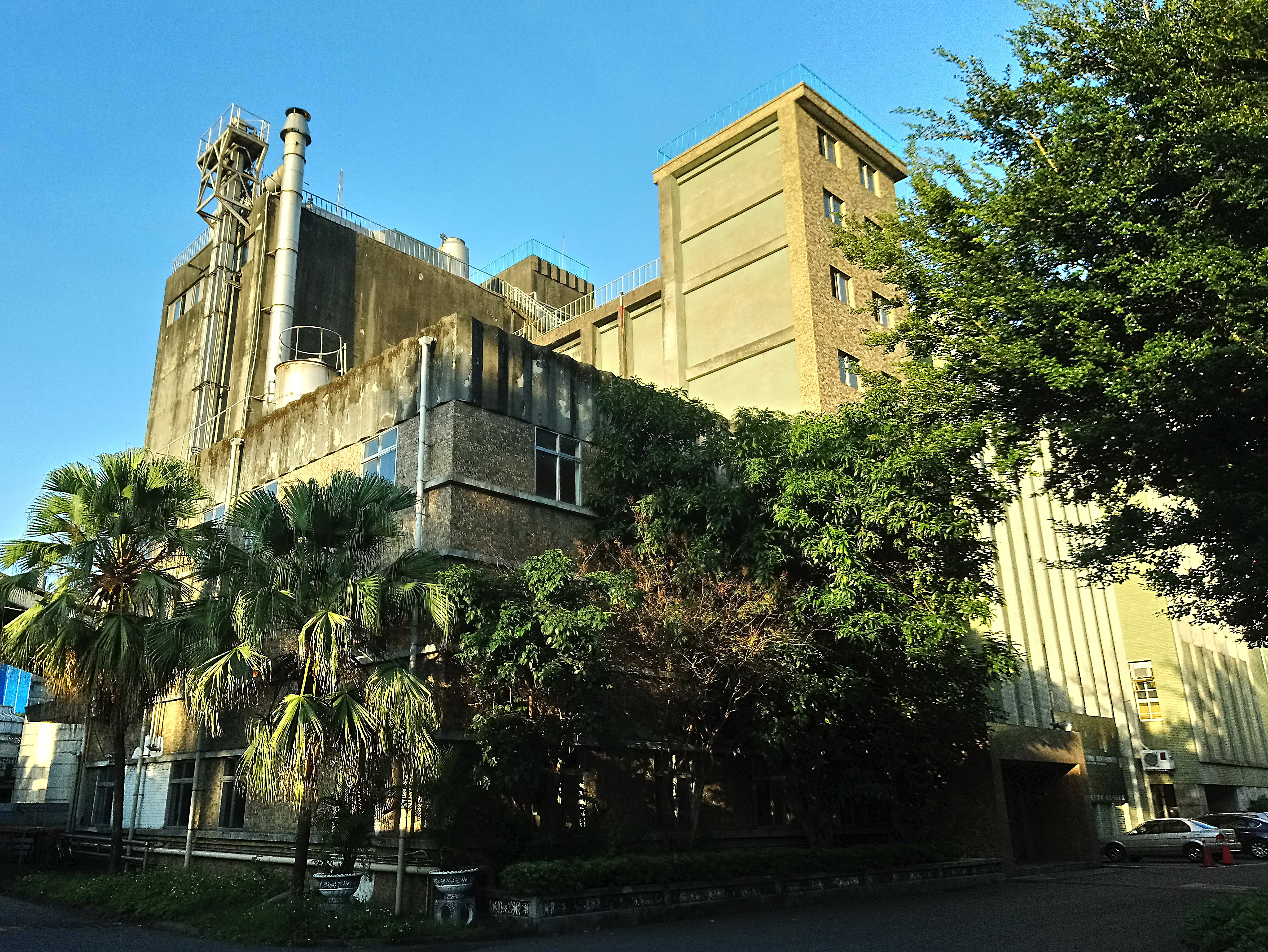 建國啤酒廠釀造大樓,臺北市中山區朱厝崙次分區朱園里